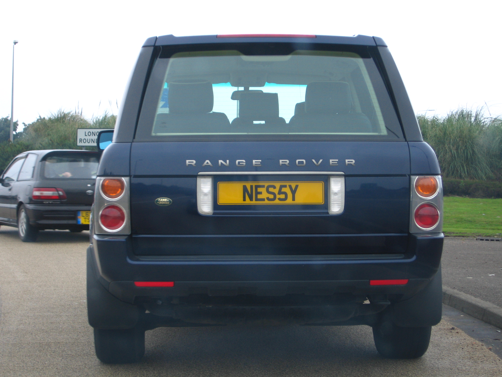 Plaque d'immatriculation formant le mot "Nessy"